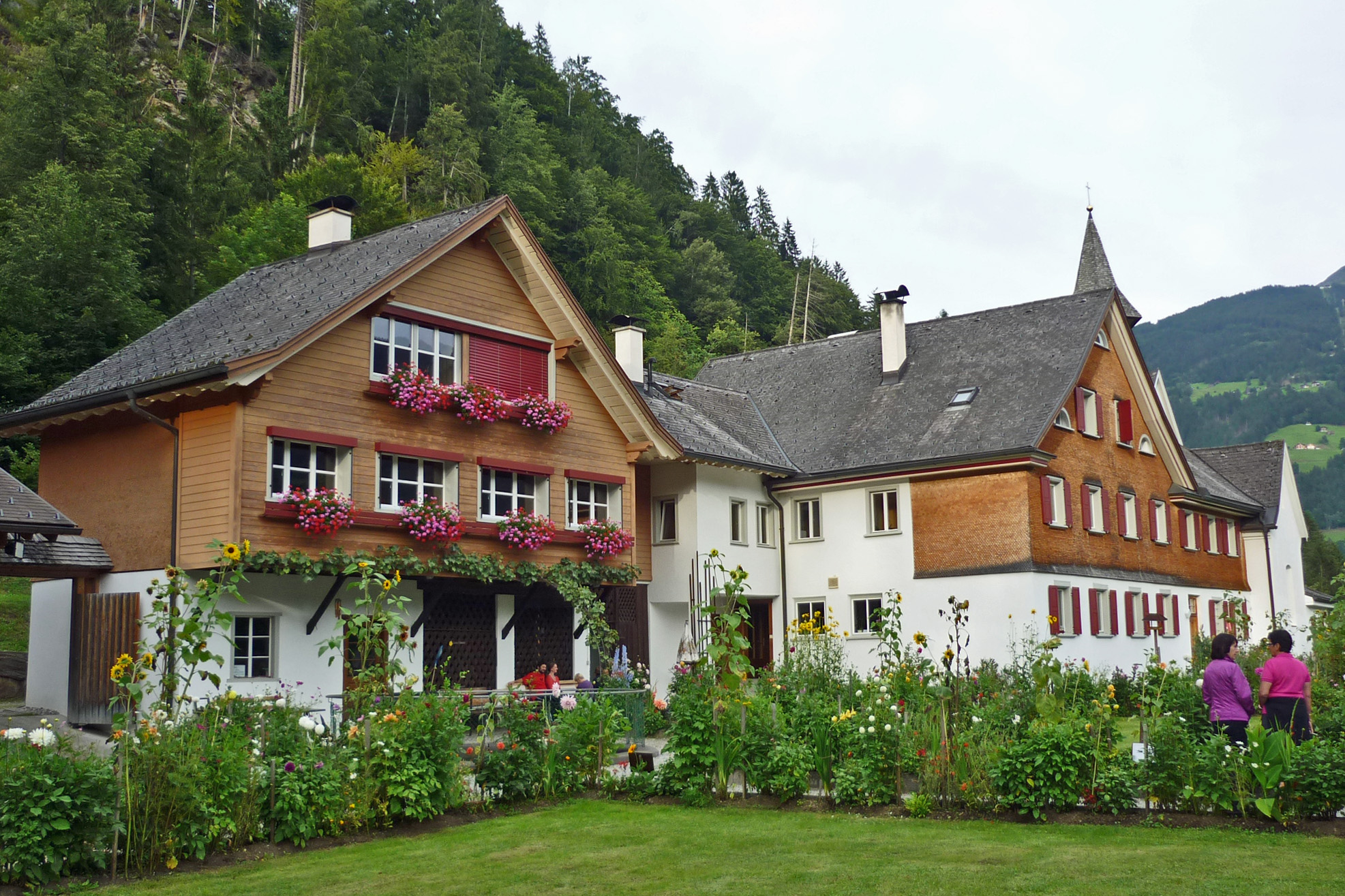 Kloster Gauenstein in Schruns im Montafon Object location47° 05′ 01.5″ N, 9° 54′ 09.8″ E